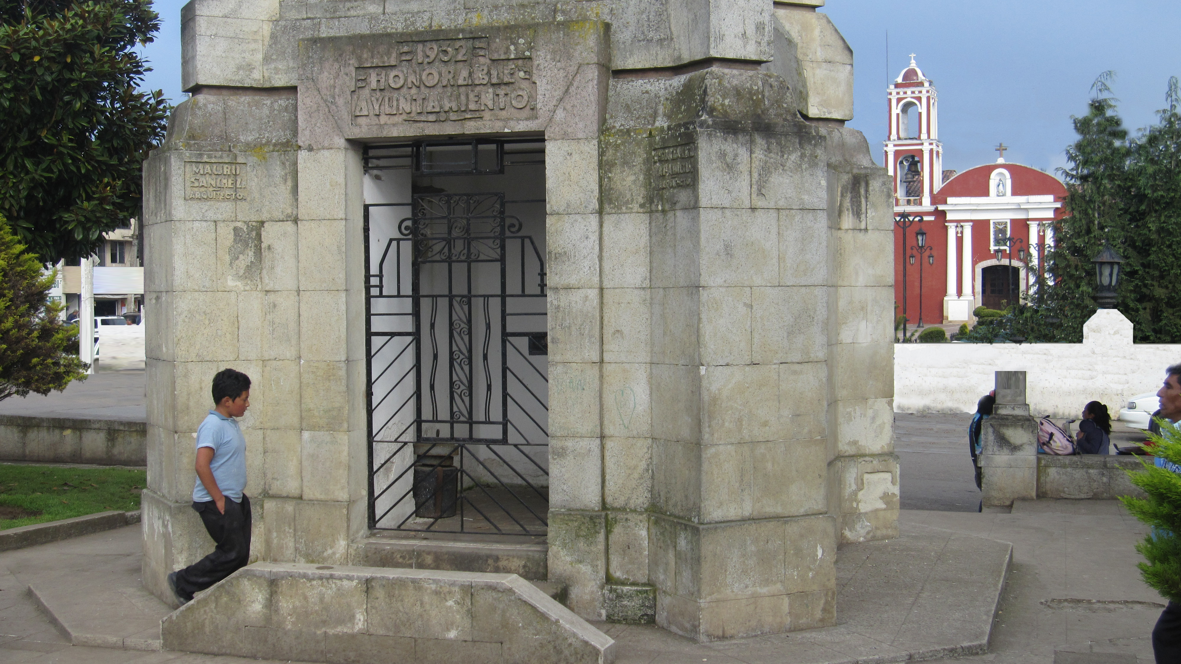 Vista desde la plazoleta del reloj público de Acaxochitlán.